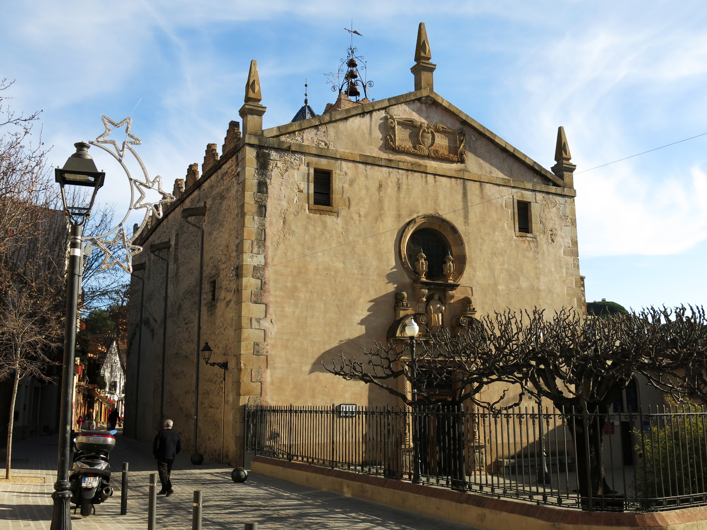 Església de Sant Feliu d'Alella